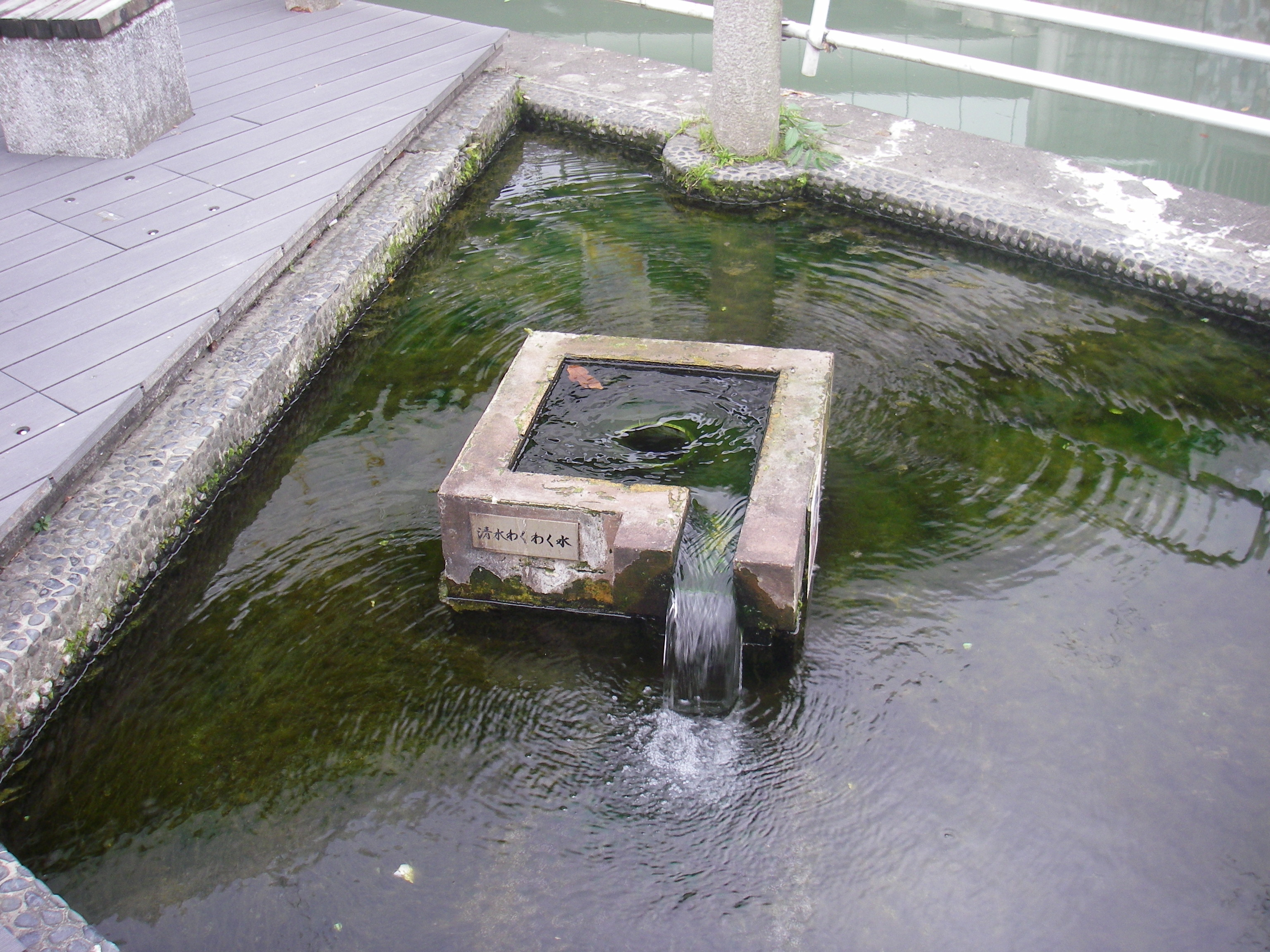 名古屋市の堀川、北清水親水広場（北区）の「清水わくわく水」。近隣の土地に降った雨水が湧き出したもの。